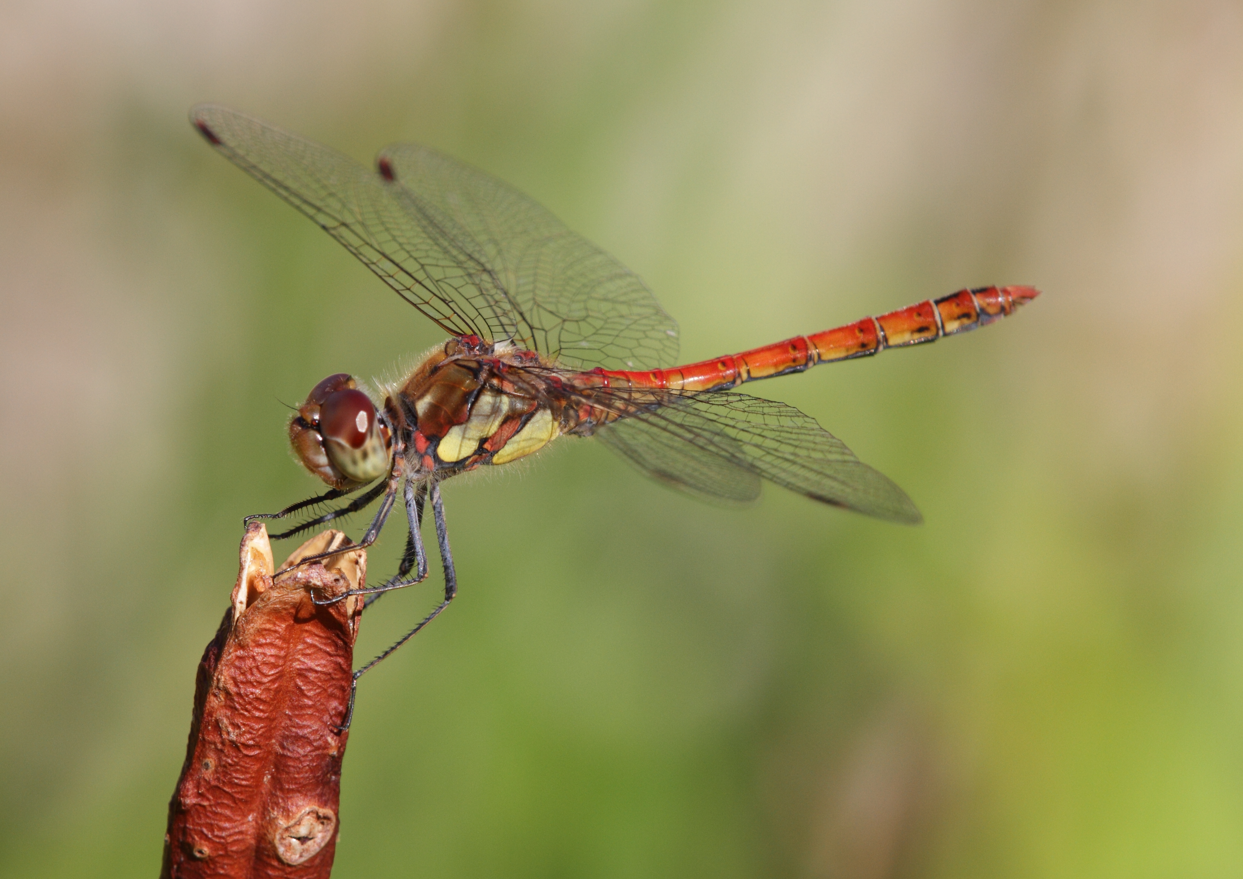 Große Heidelibelle Sympetrum striolatum im Botanischen Garten der Universität Wien.